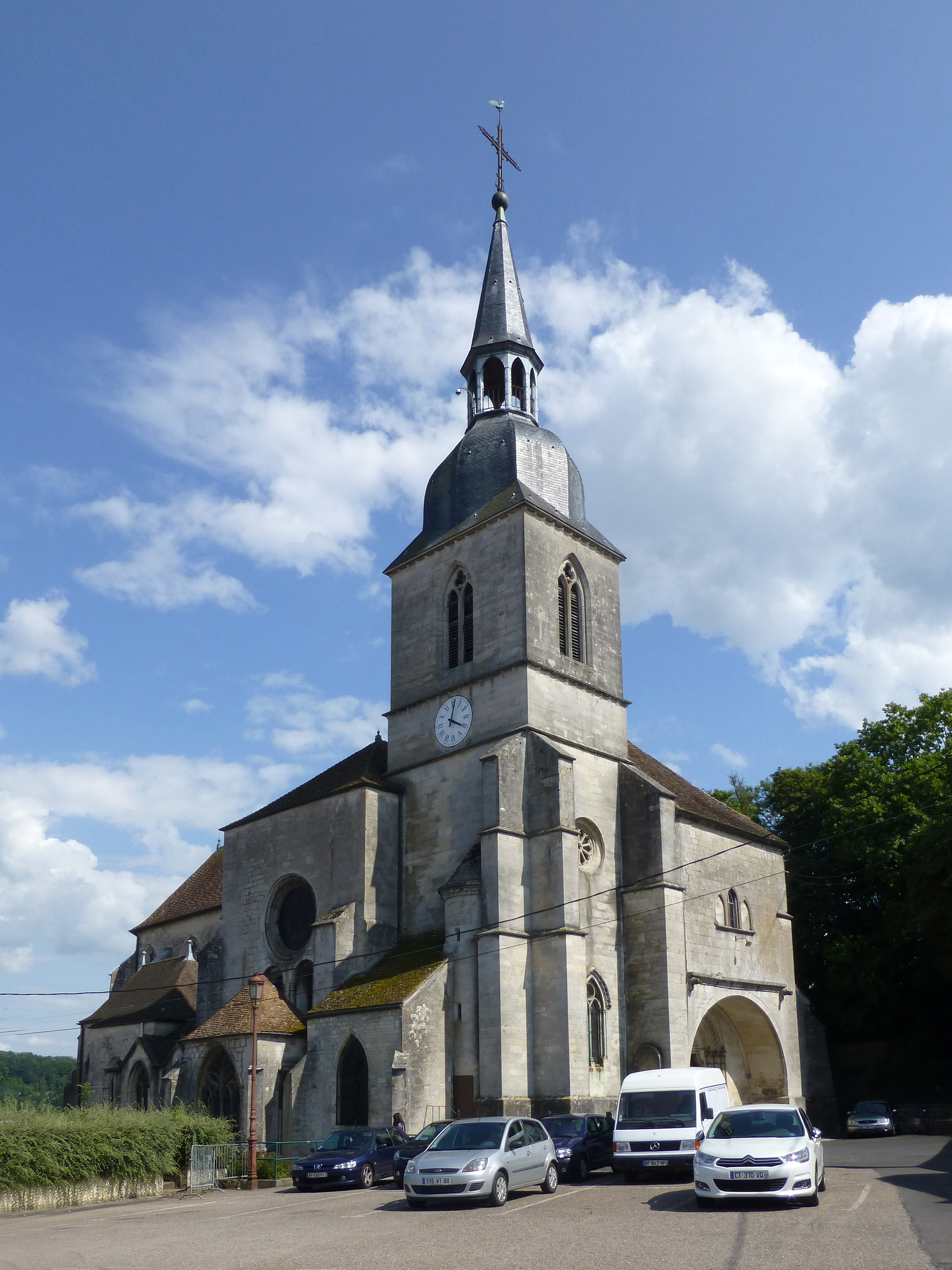 Église Saint-Nicolas de Neufchâteau (Vosges)